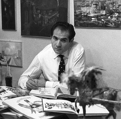 Italian fashion designer Angelo Litrico